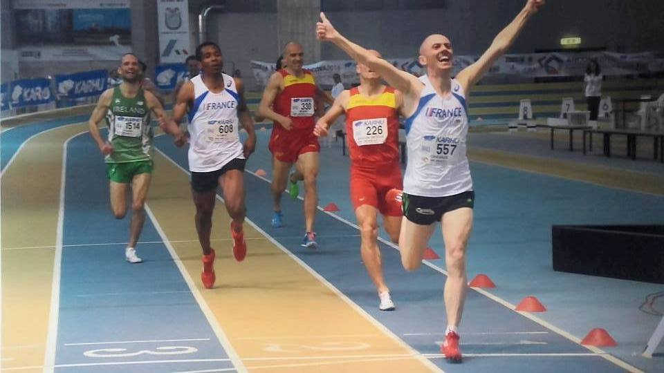 Champion d' europe en salle sur 800m Ancona 2016